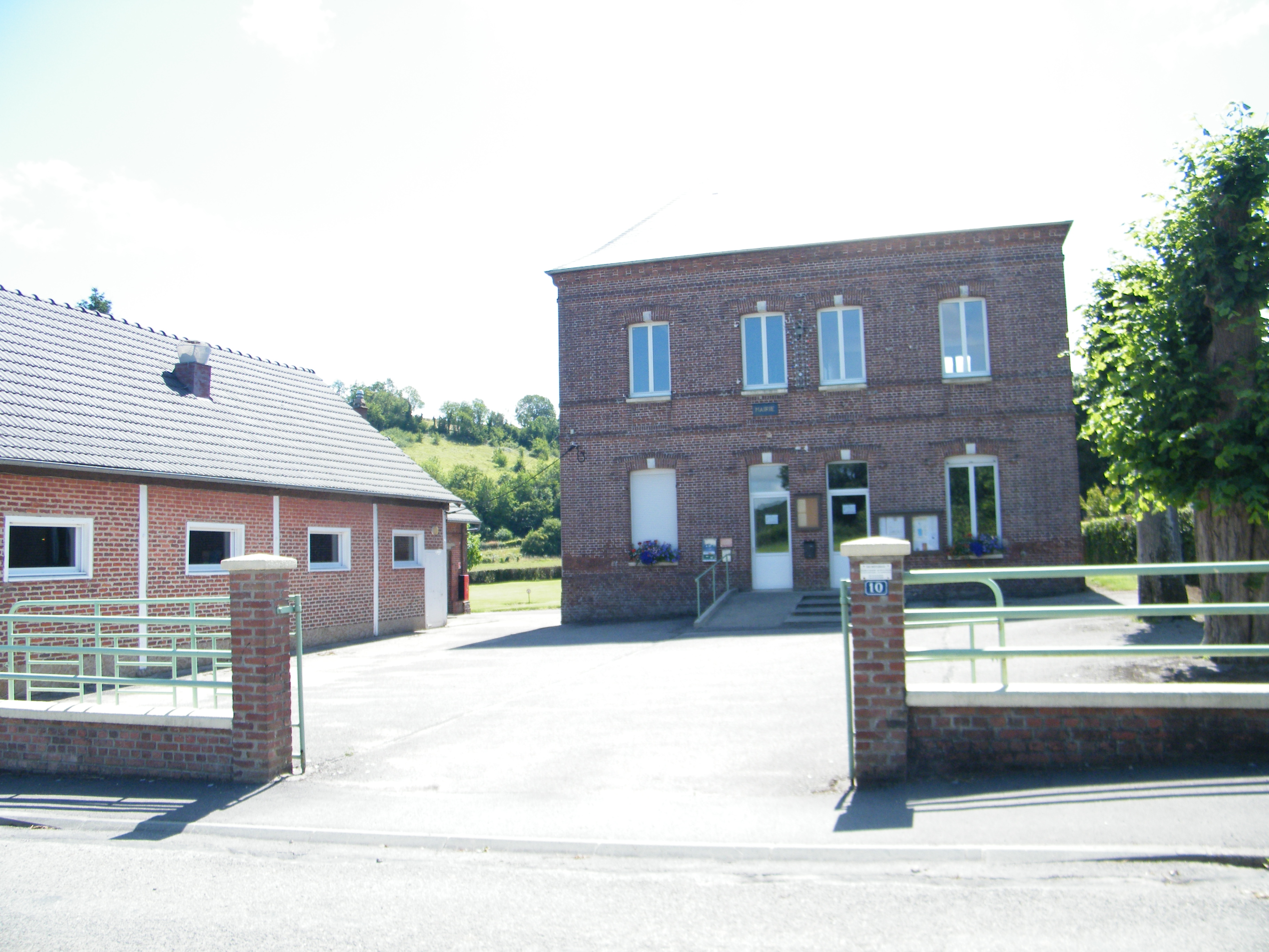 Avesnes-en-Val, Seine-Maritime, France, la mairie.